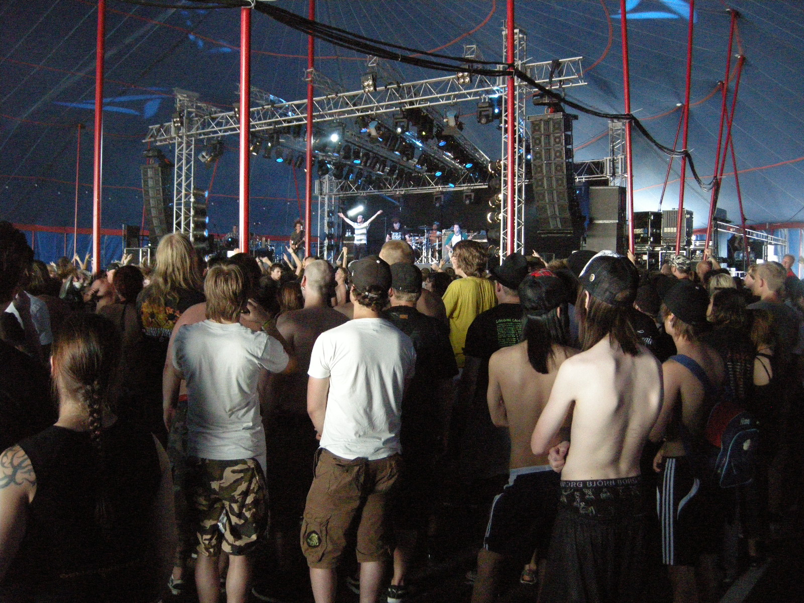 Minsta scenen, Close Up-tältet, på Metaltown 2009. August Burns Red på scen.